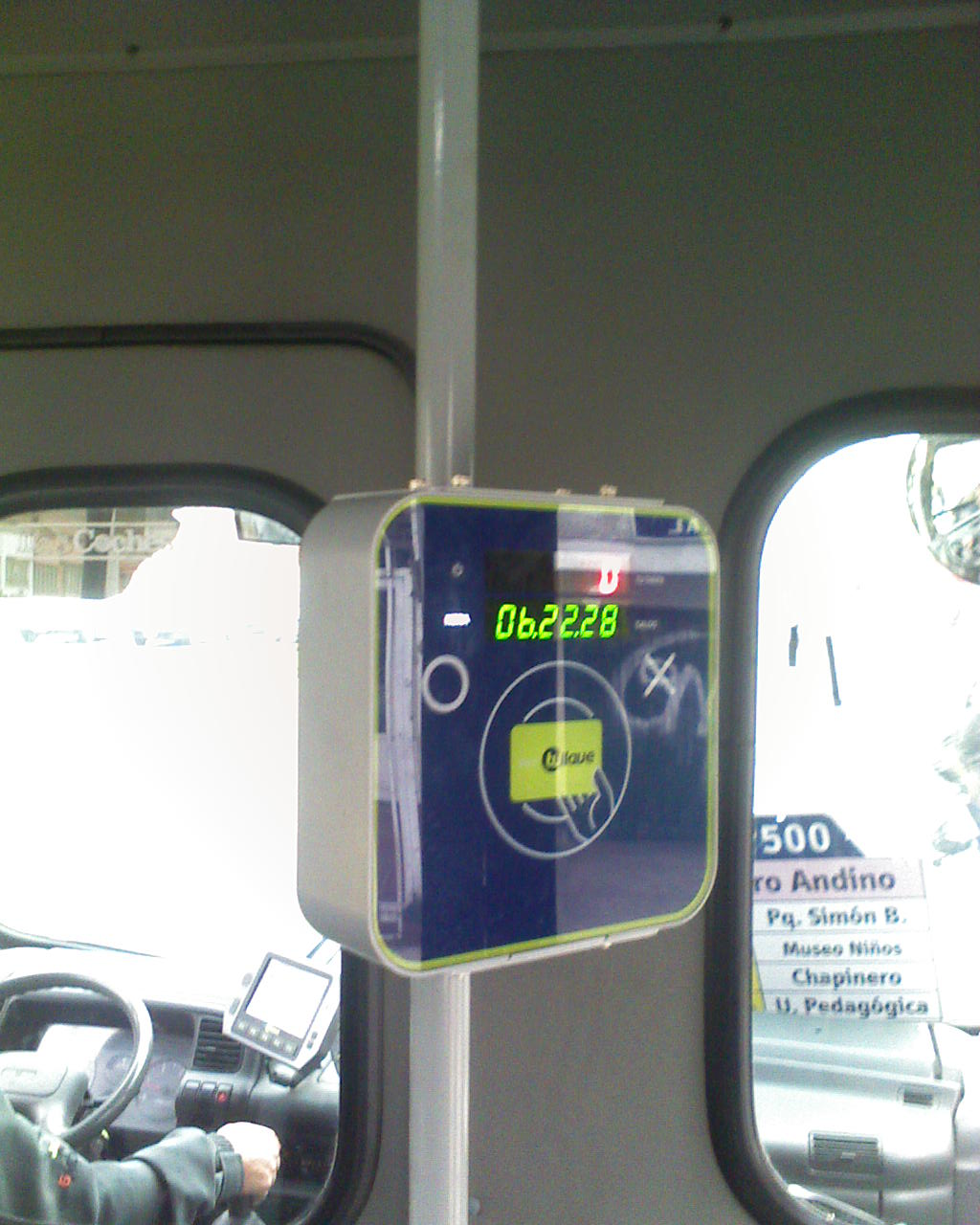 lalalala